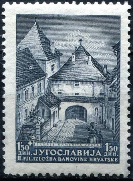 Почтово-благотворительная марка Югославии. Вторая национальная филателистическая выставка в Загребе